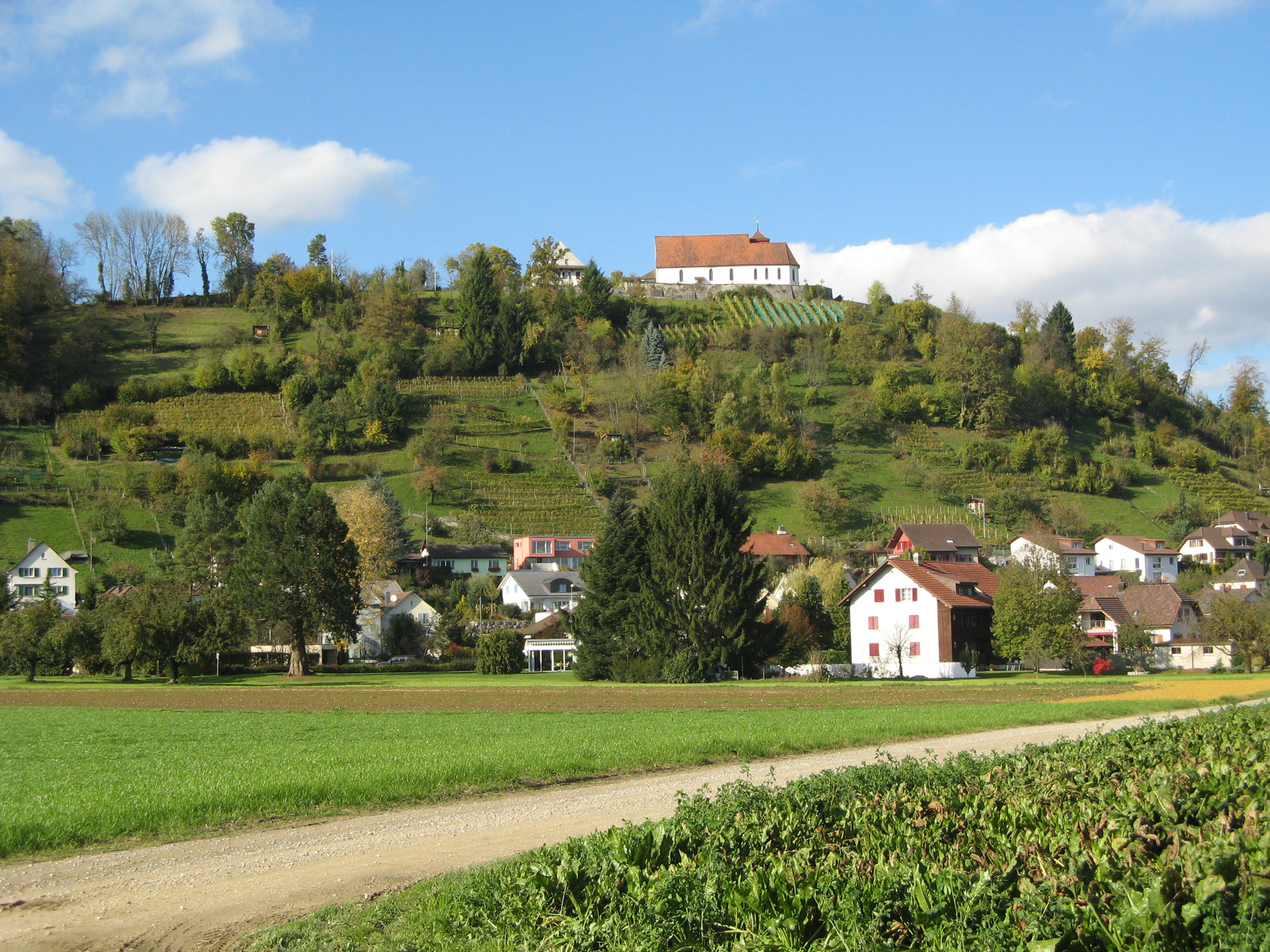 Ansicht von Staufen mit Staufberg und Kirche